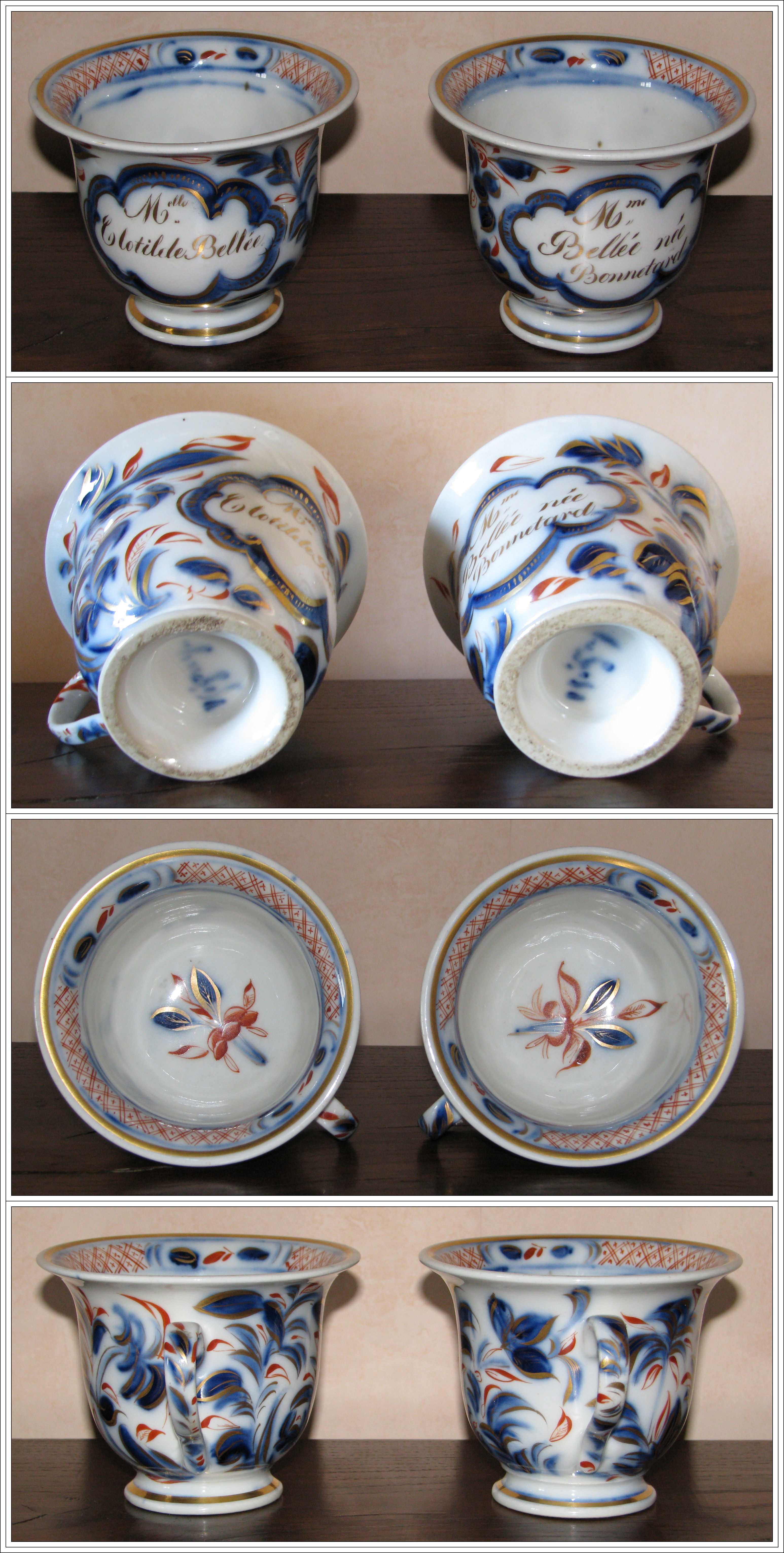 Tasse 1 au nom de Mlle Clotilde Bellée Tasse 2 au nom de Mme Bellée née Bonnetard